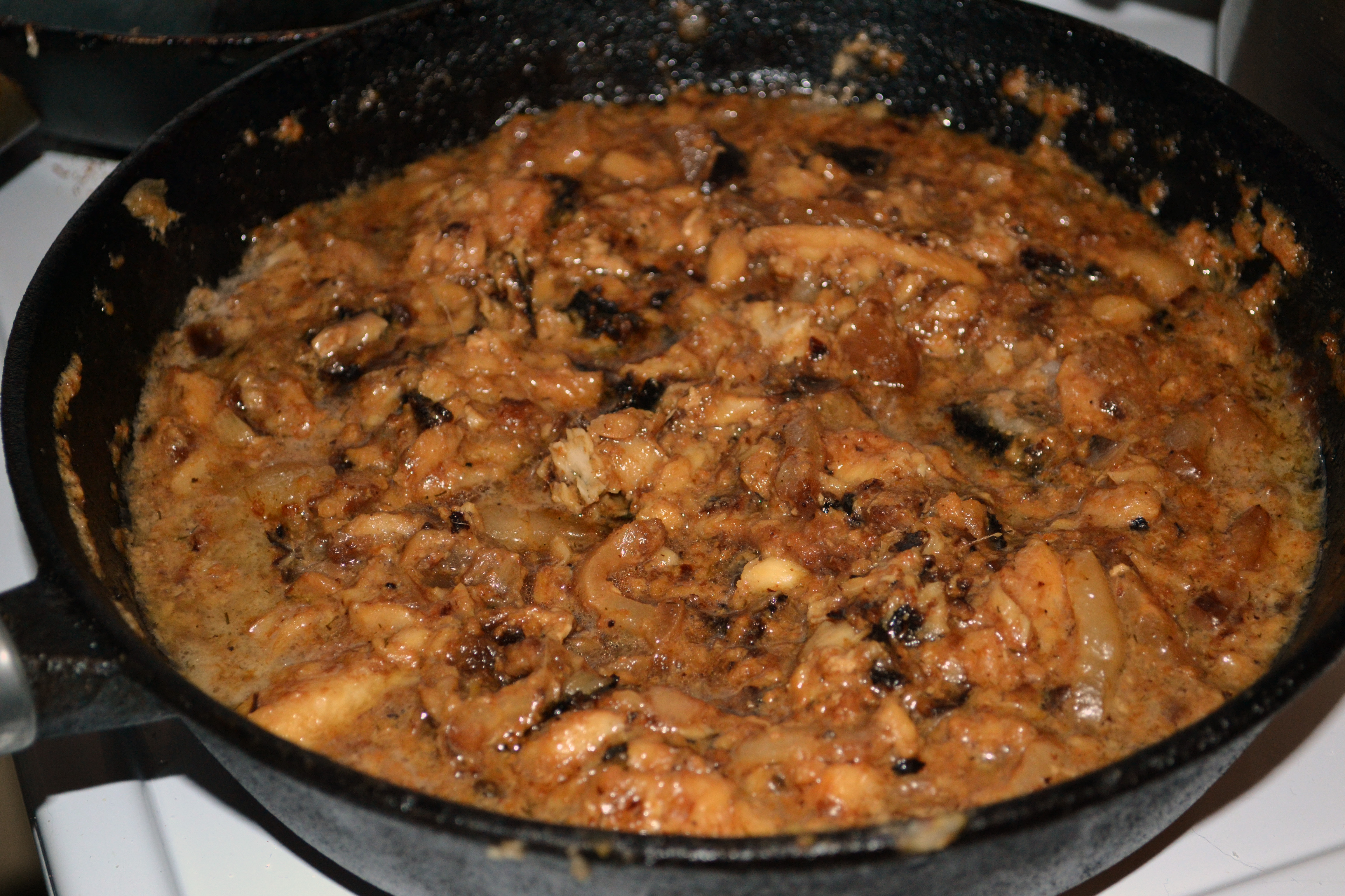 Беларуская (тарашкевіца): Салака ў соўсе з салам. Ўільям Пахлёбкін называе гэтую страву «сыльгуд пэкікастмэс», аднак эстонцы ведаюць яе пад назовам «раймэкастэ».